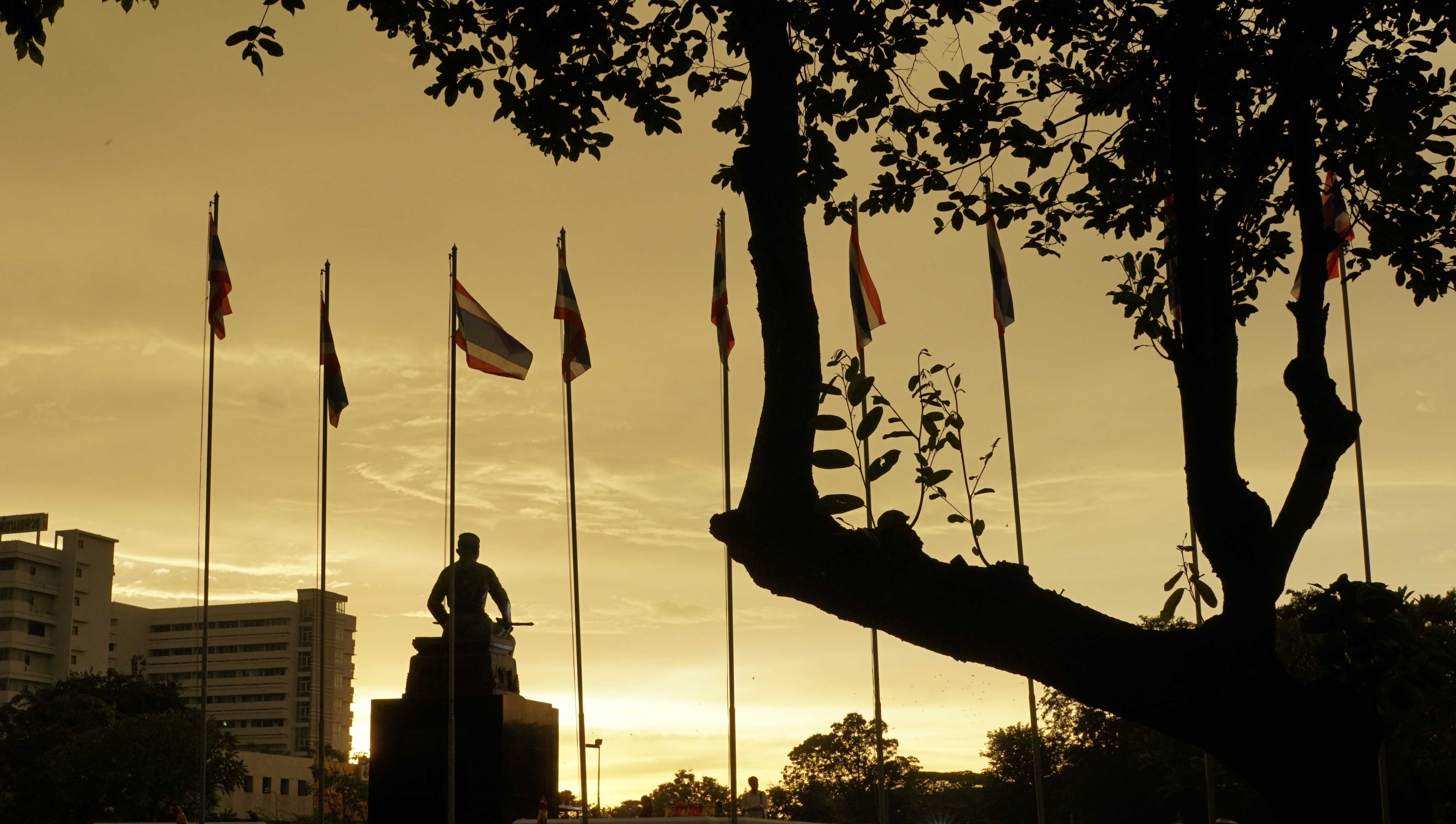 ลานพระบรมราชนุสาวรีย์ฯ